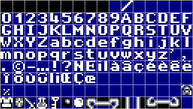 Exemple d'affichage d'éléments graphiques (en l'occurrence une police de caractères) contenus dans une image ROM dans le cadre d'un hacking de ROM, ainsi qu'on peut le voir dans un éditeur de tuiles.